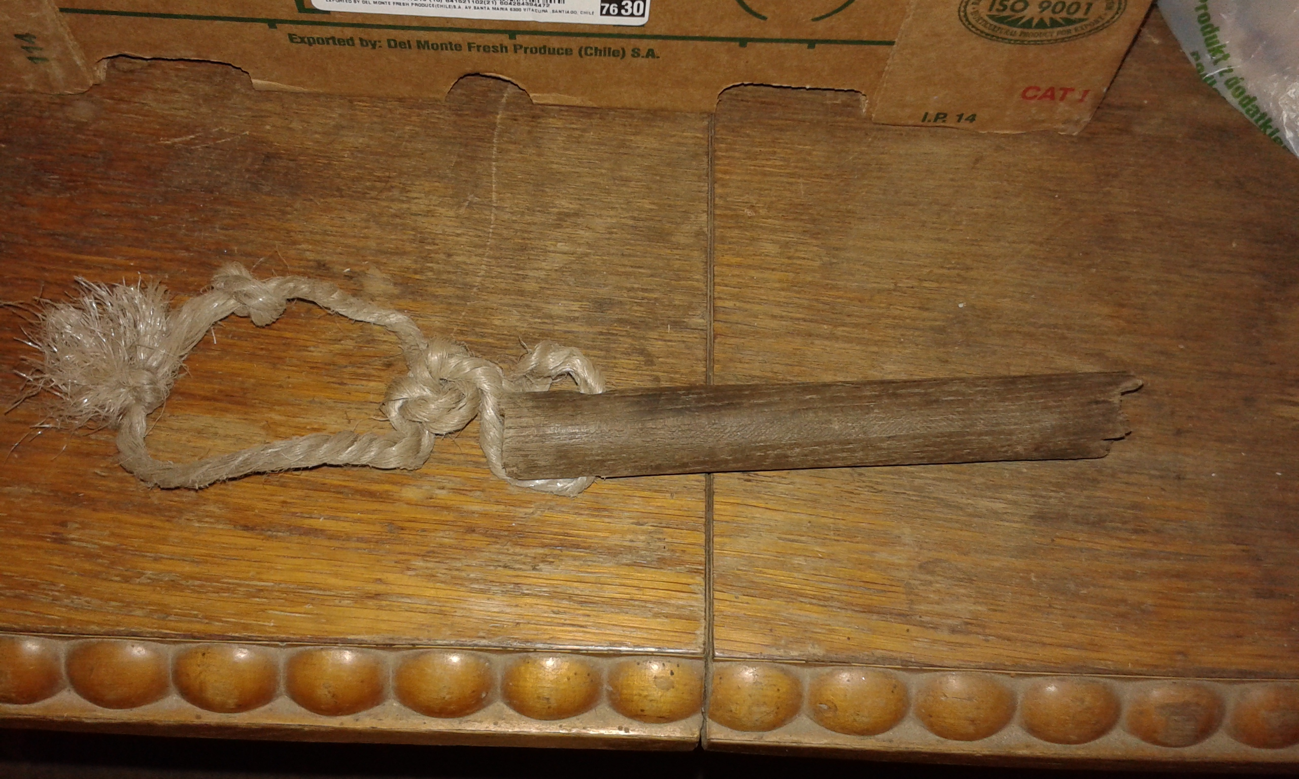 Dutka.